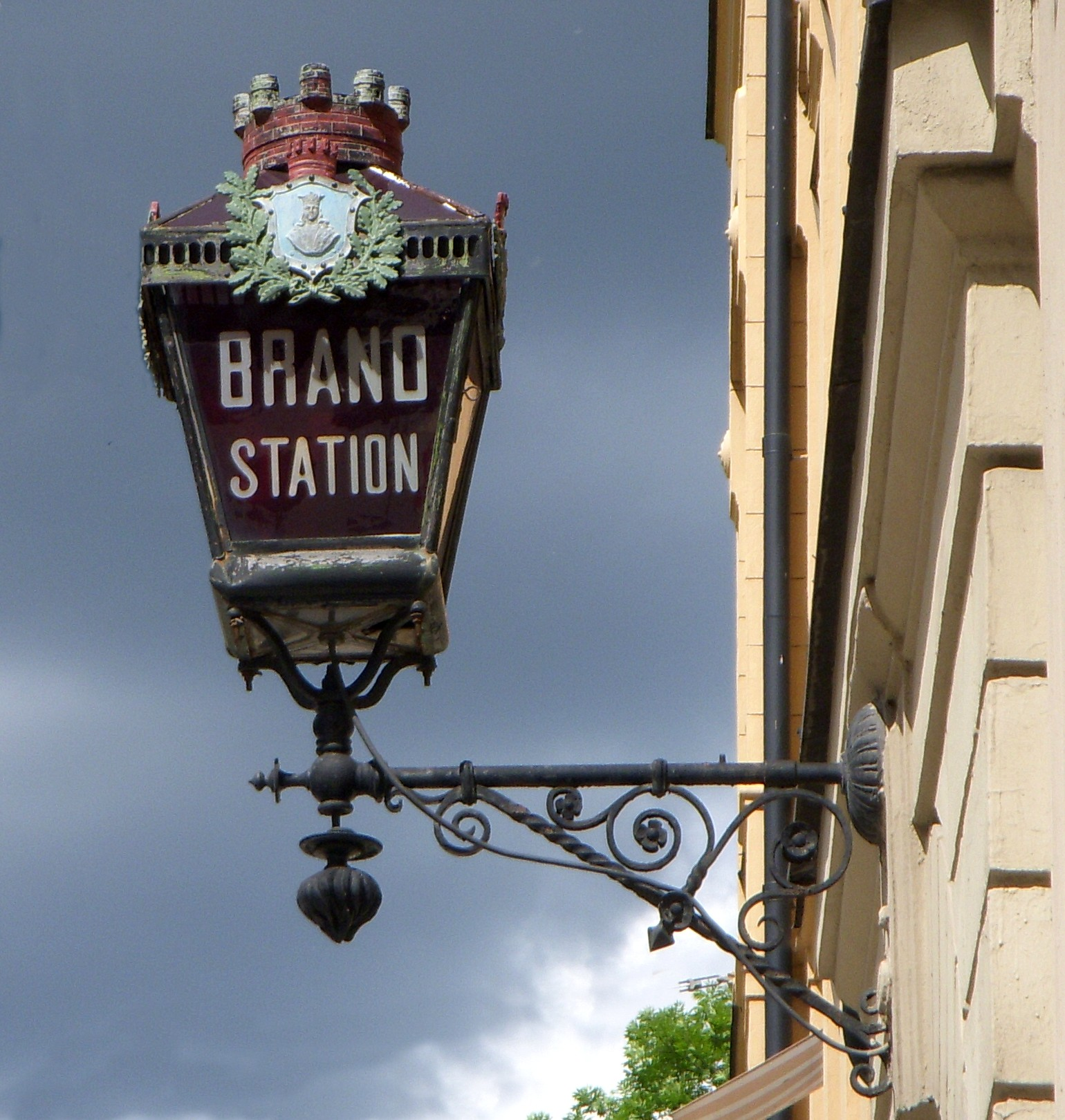 Storstockholms brandförsvar, lykta vid Johannes brandstation